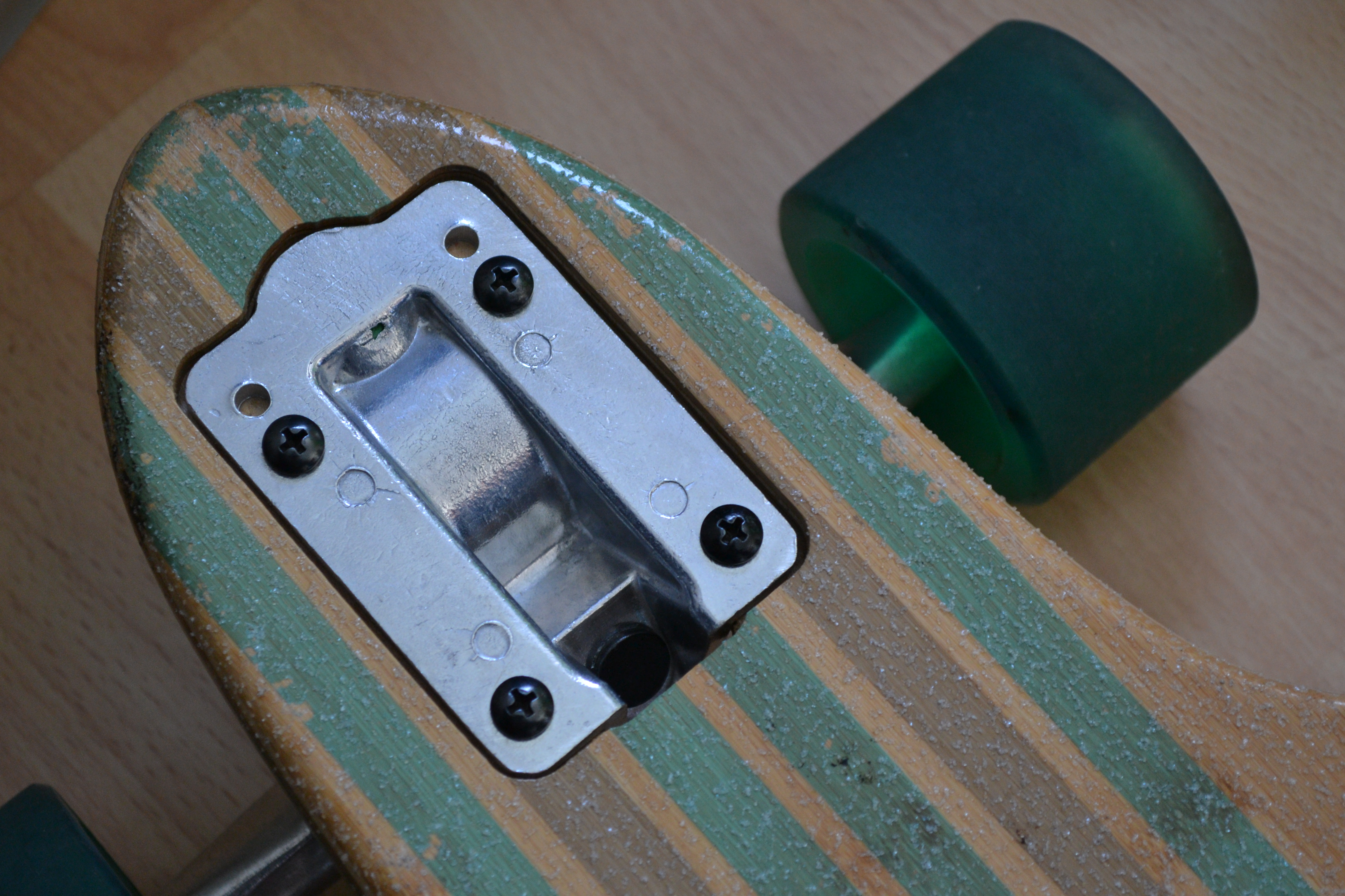 Longboard Globe Bamboo Prowler